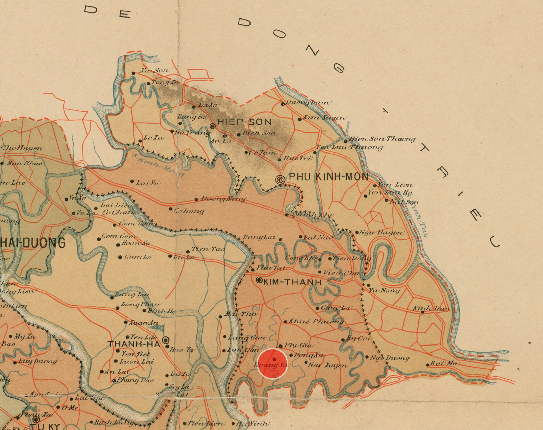 Liên Hòa (Hoàng Xá) trong bản đồ của Schneider tháng 05 năm 1891